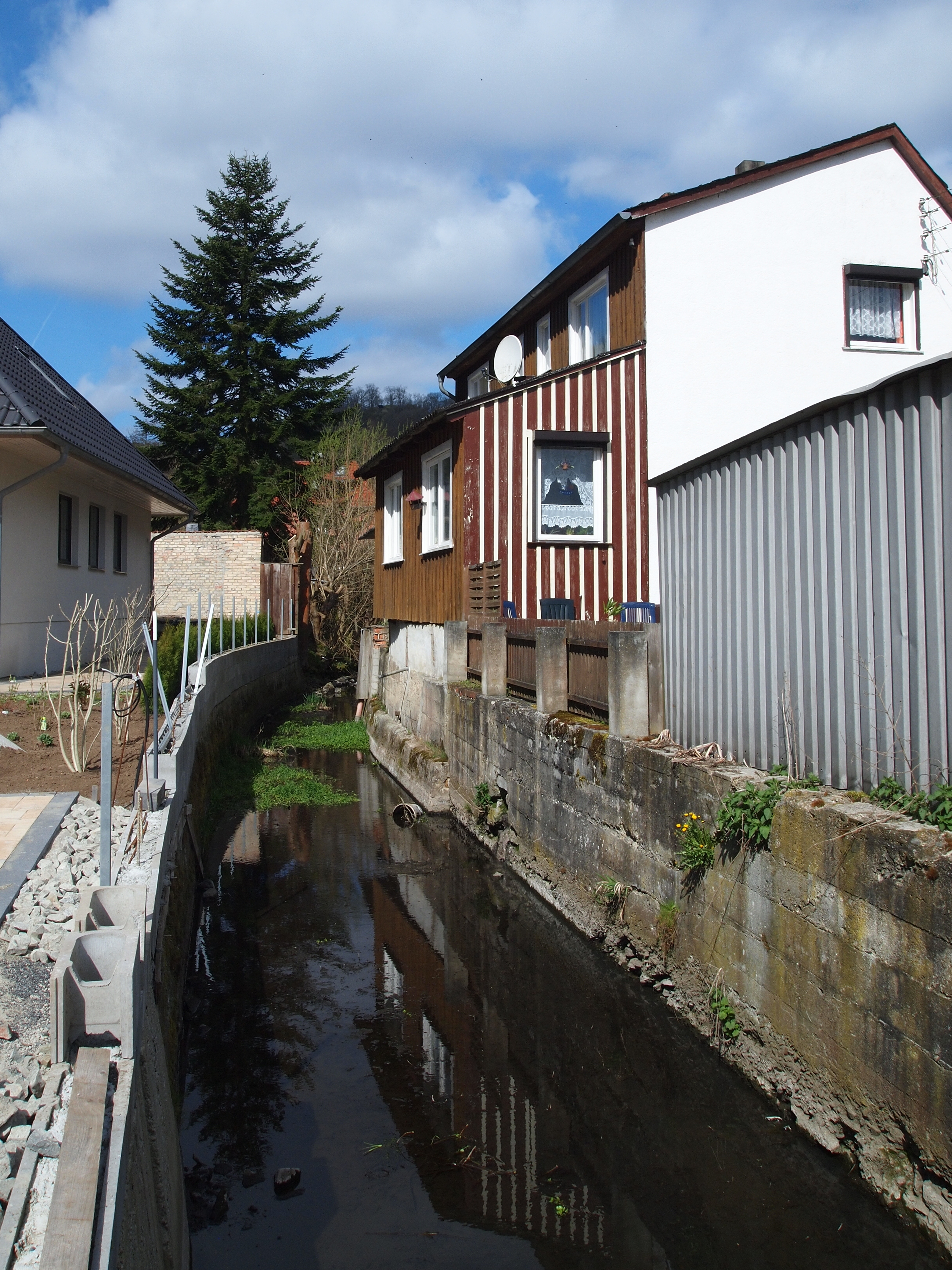 Altenbrak, Stadt Thale, Landkreis Harz, Sachsen-Anhalt; Mühlengraben im Ortsbereich Sankt Ritter